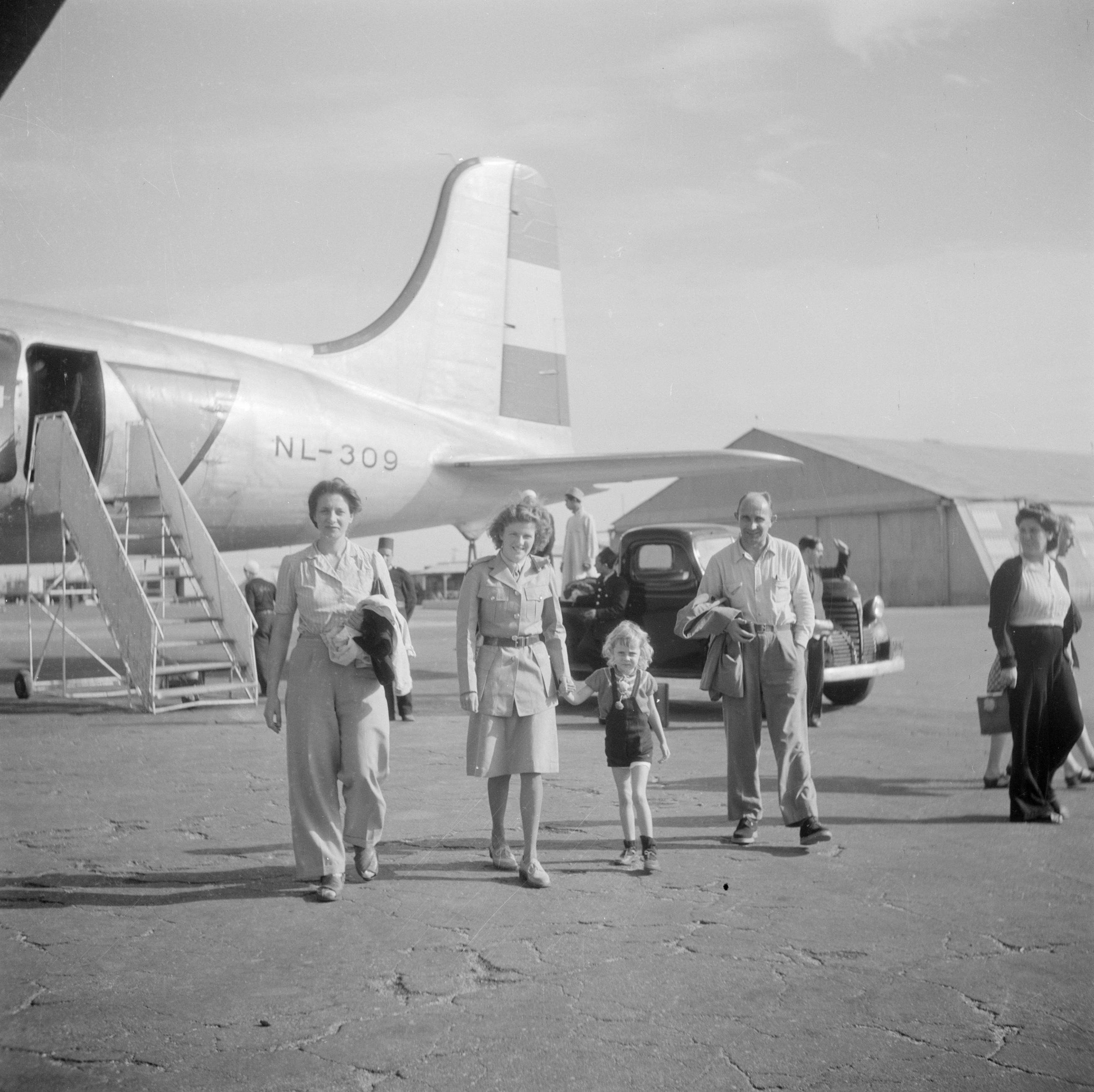 Collectie / Archief : Fotocollectie Van de Poll Reportage / Serie : Repatriëringsdienst Indië Beschrijving : Aankomst met het vliegtuig op Ataka (Egypte) Datum : december 1945 Locatie : Ataka, Egypte Trefwoorden : passagiers, vliegtuigen Fotograaf : Poll, Willem van de, [onbekend] Auteursrechthebbende : Nationaal Archief Materiaalsoort : Negatief (zwart/wit) Nummer archiefinventaris : bekijk toegang 2.24.14.02 Bestanddeelnummer : 255-6948